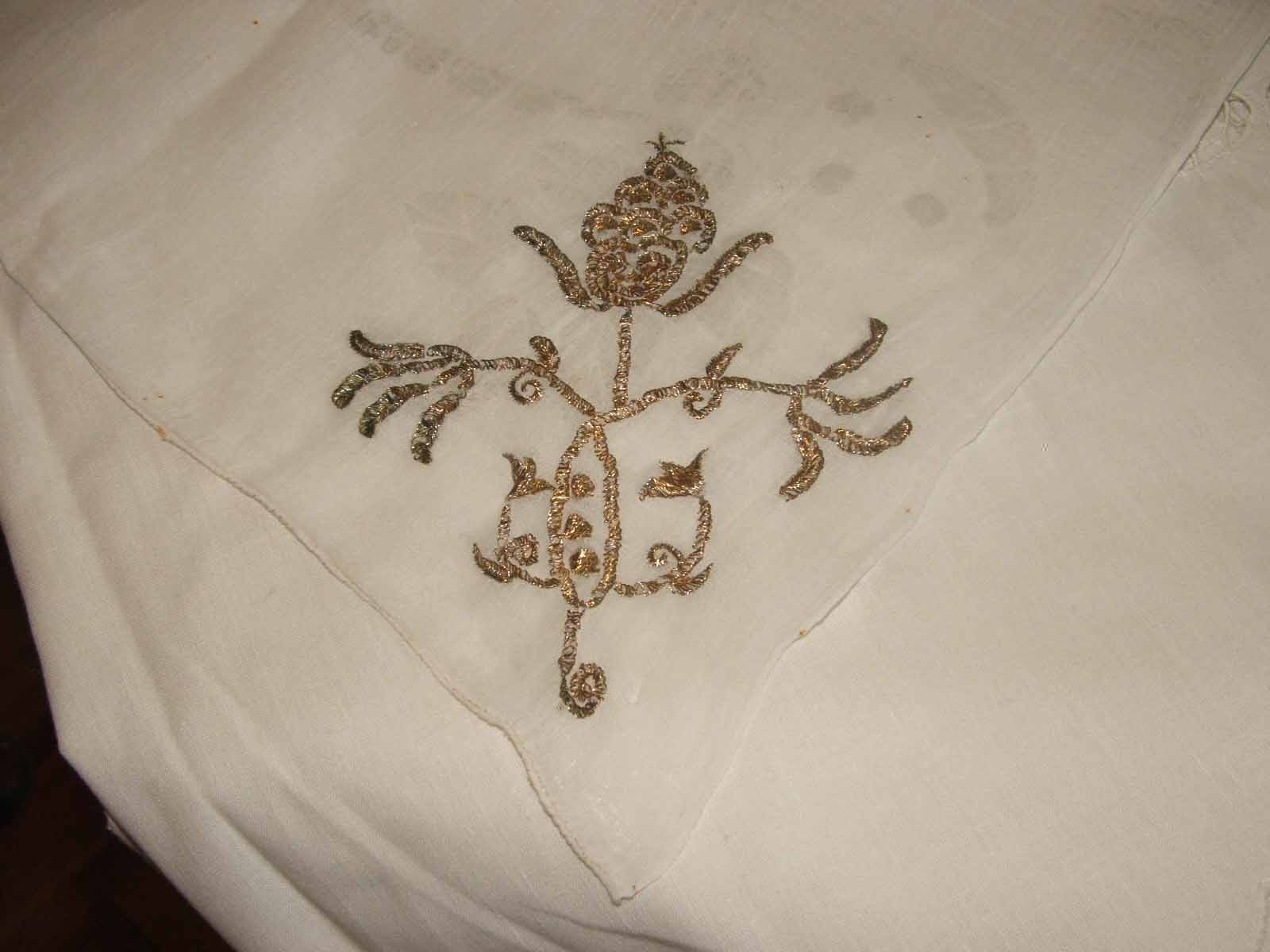 a legrégebbiek